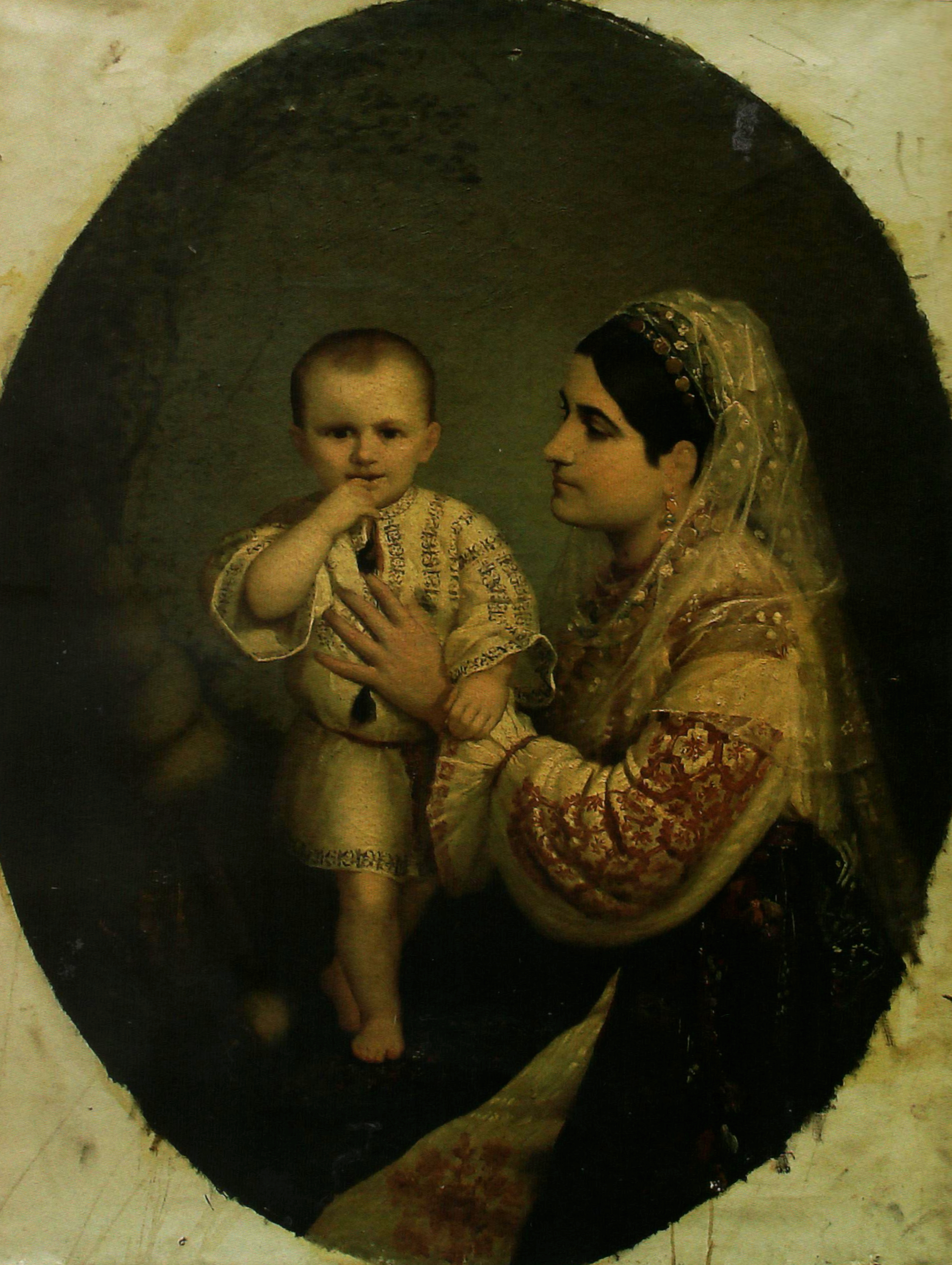 Sava Henţia (1848 - 1904) - Doamna Davila cu fiul, Muzeul Municipiului Bucureşti, semnat, datat stânga oblic, cu roz: S. Henţia/1879. Sub ramă, în colţurile nepictate, sunt diferite inscripţii greu descifrabile: stg. sus: epr../...amansky (Viena); dr. sus: Henţia; stg, jos: ...Epitafu/ făcut pentru/ Mitropolia din Sibiu/depus la / ...